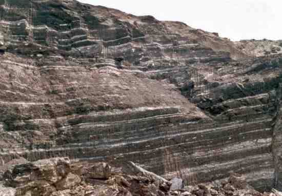 ภาพแสดงหินโผล่ของชั้นถ่านหินลิกไนต์และชั้นตะกอนดิน โดยชั้นล่างสุดมีอายุมากที่สุด